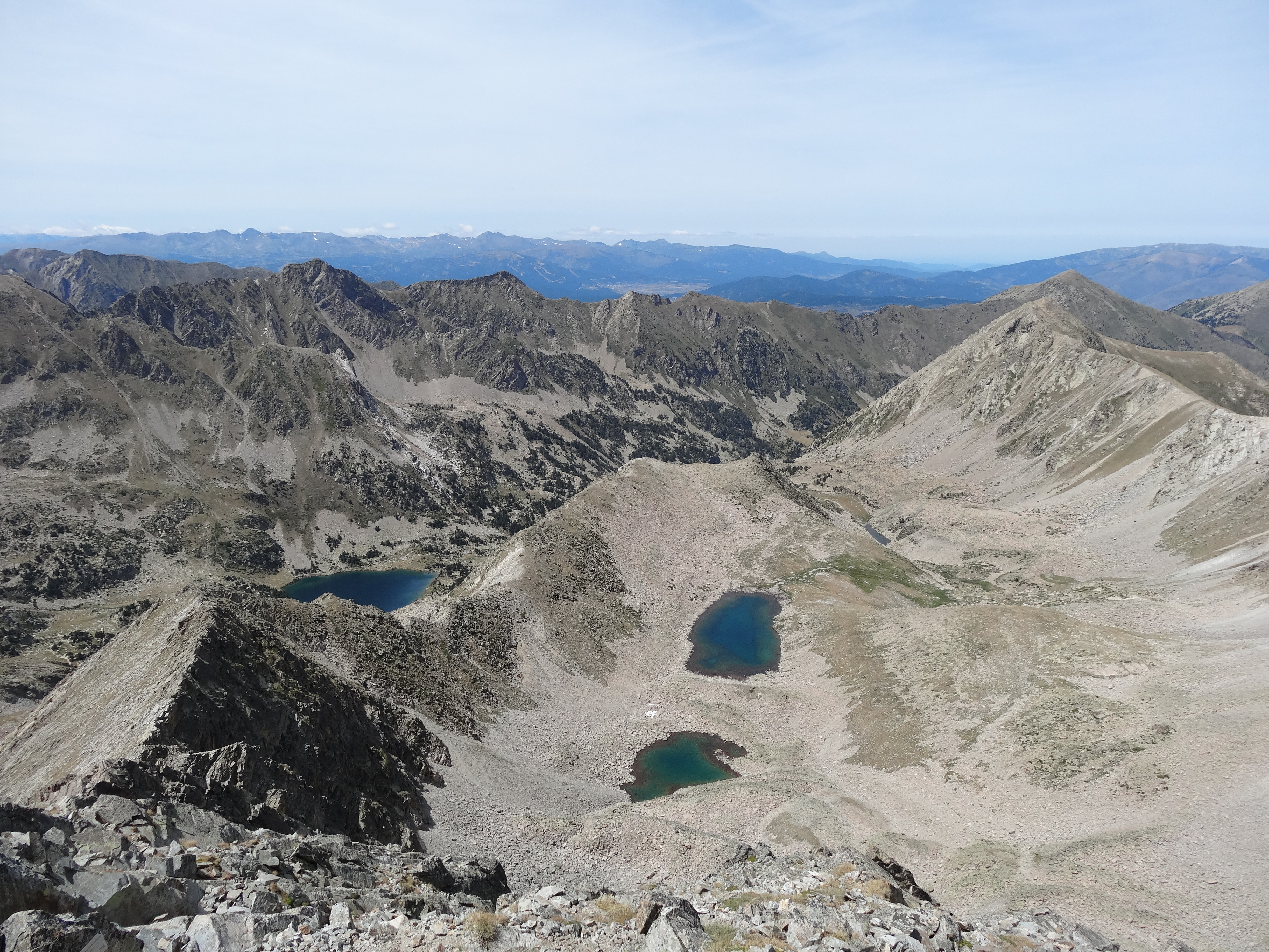 Circ de Carançà des del Pic de l'Infern (juliol 2012)